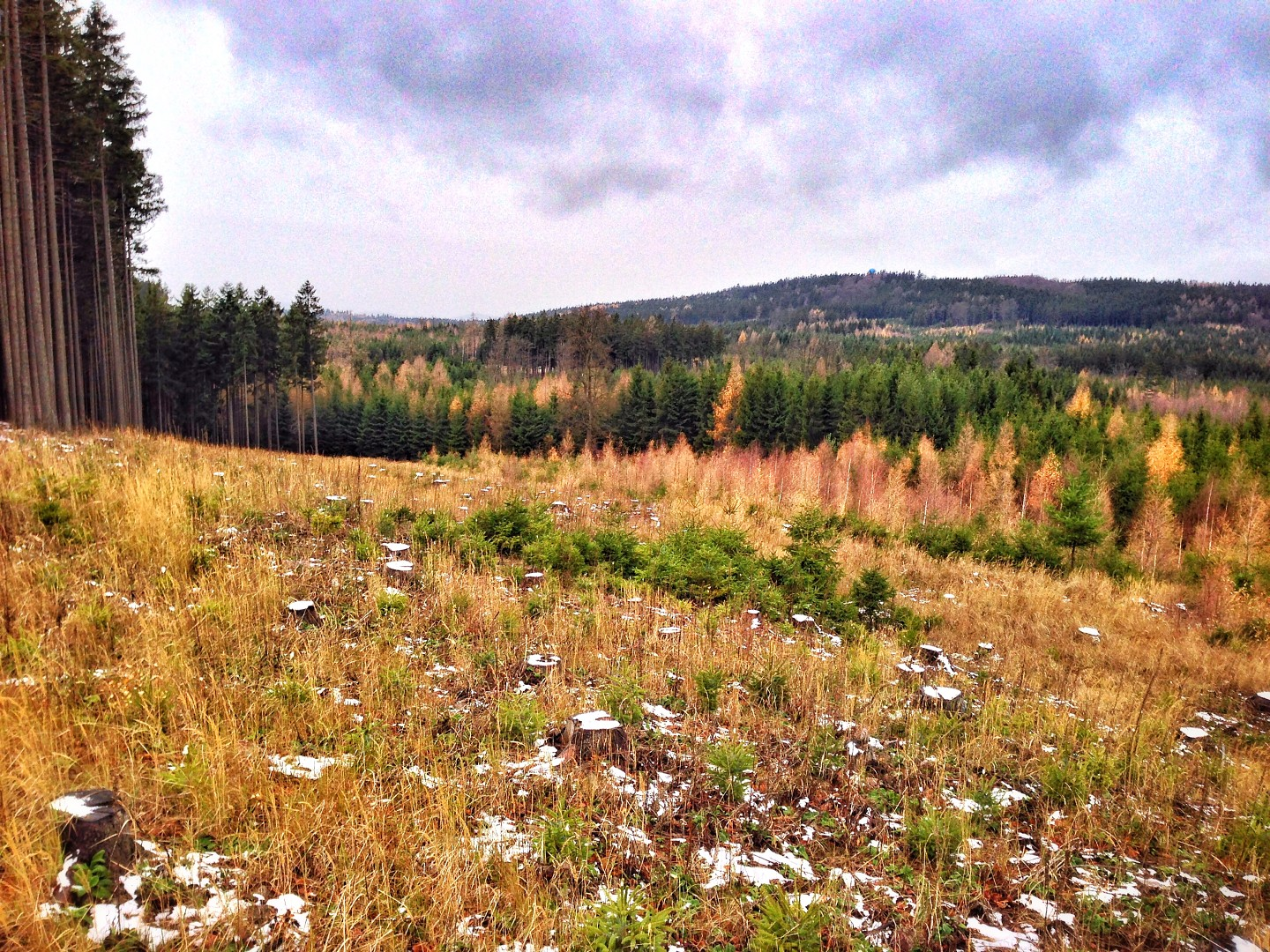 Písek z Malého vrchu, od jihovýchodu